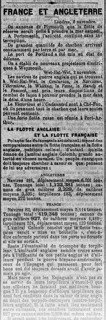 Début d'un article du Petit Journal (Paris) daté du 3 novembre 1898 portant sur les forces navales respectives de la Grande-Bretagne et de la France.